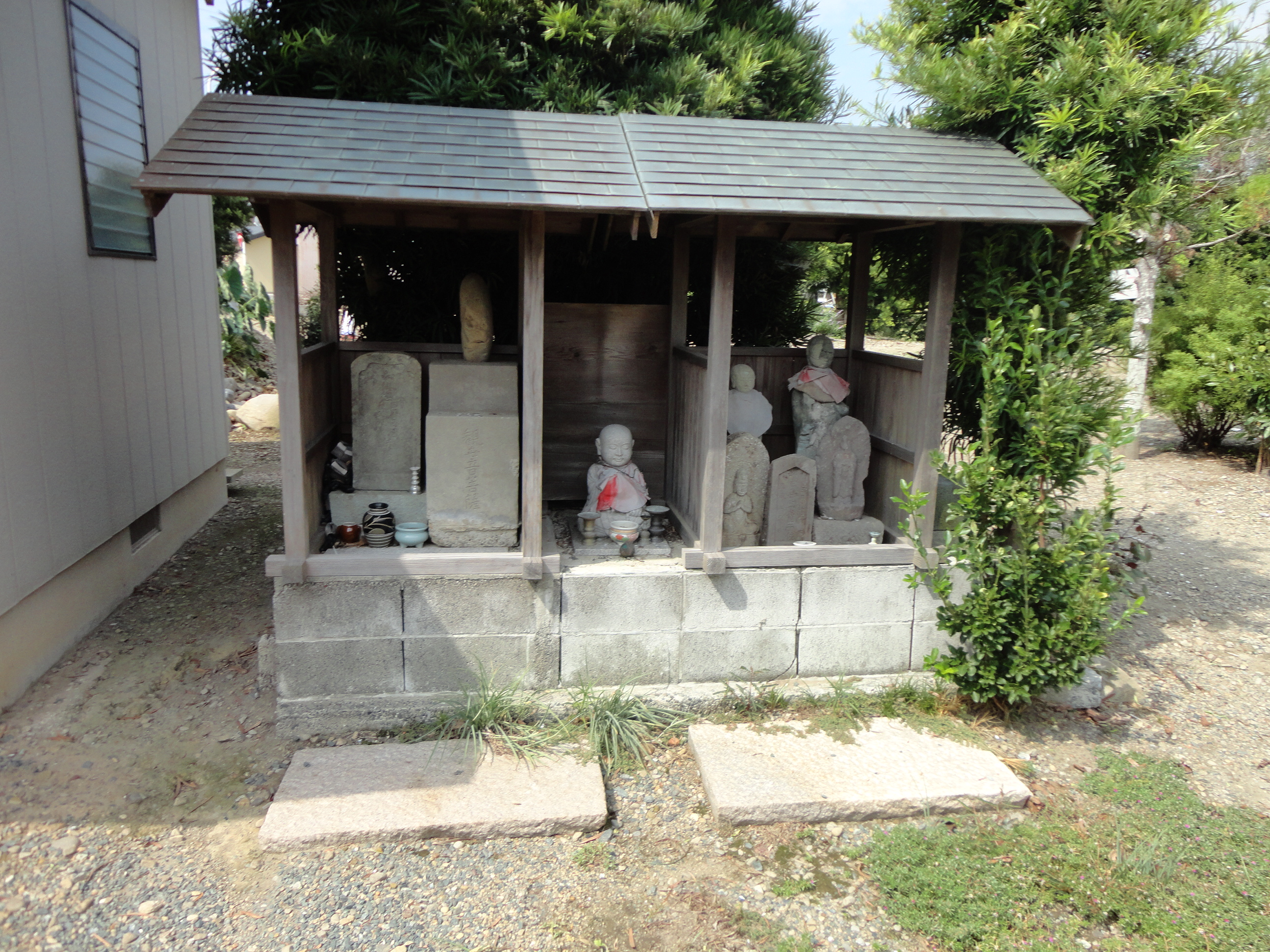 昌雲寺にある地蔵堂